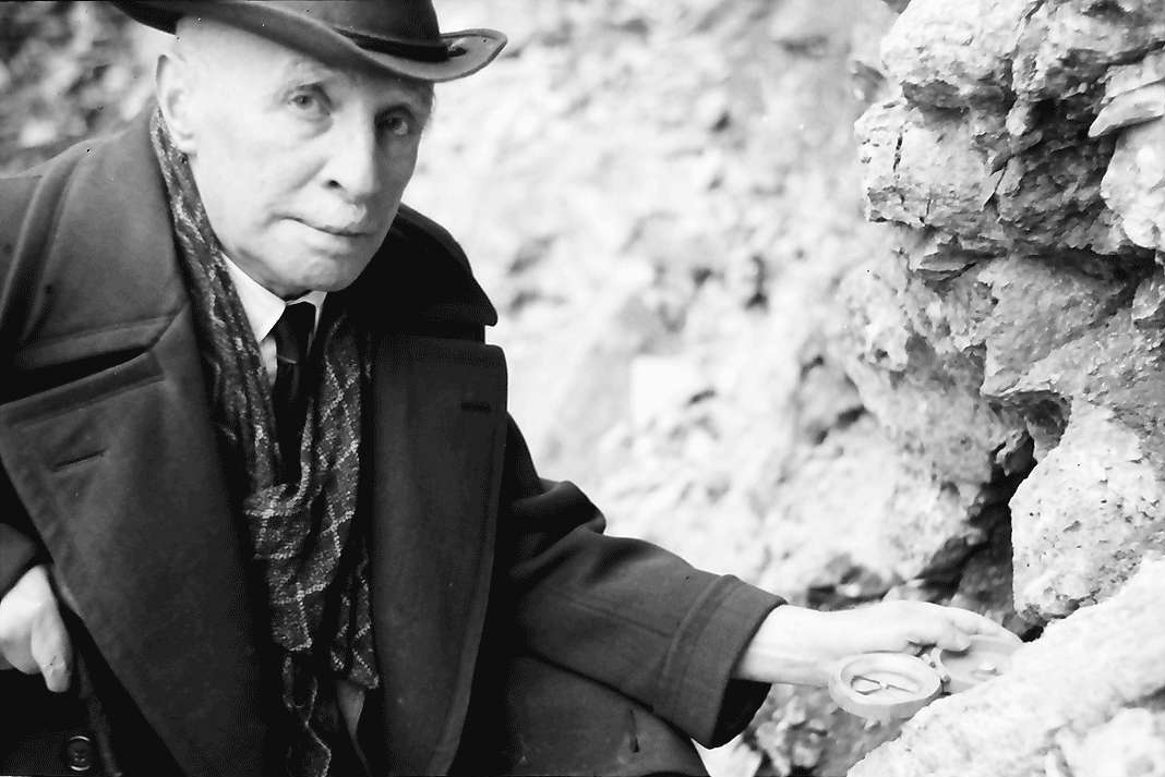 Stallegg: Prof. Schnarrenberger misst mit Kompass